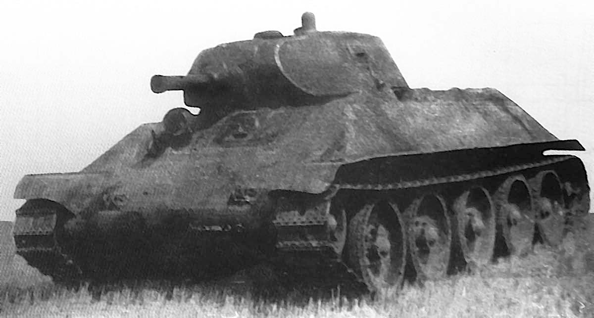 Советский средний танк периода Второй мировой войны